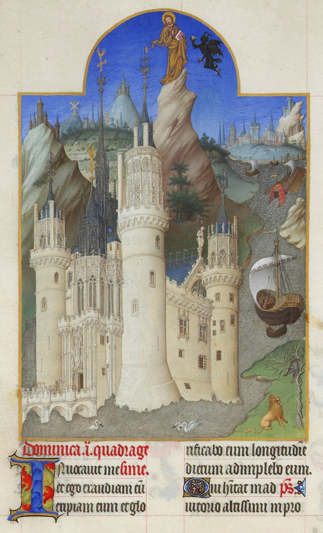 Miniature illustrant les trois tentations du Christ dans le désert à l'issu de ses quarante jours de jeûne : la tentation de transformer la pierre que lui tend le démon en pain, la tentation de se jeter du haut du pic où il est perché pour que les anges le portent jusqu'à la terre et enfin la tentation de découvrir tous les royaumes du monde, représentés par des châteaux, villes, champs fertiles et bateaux de commerces et l'offre du démon de les lui donner. Le tout est englobé dans l'imposant château de Mehun-sur-Yèvre, propriété du duc de Berry.